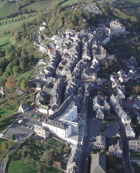 Photographie aérienne du Mur-de-Barrez (Aveyron)